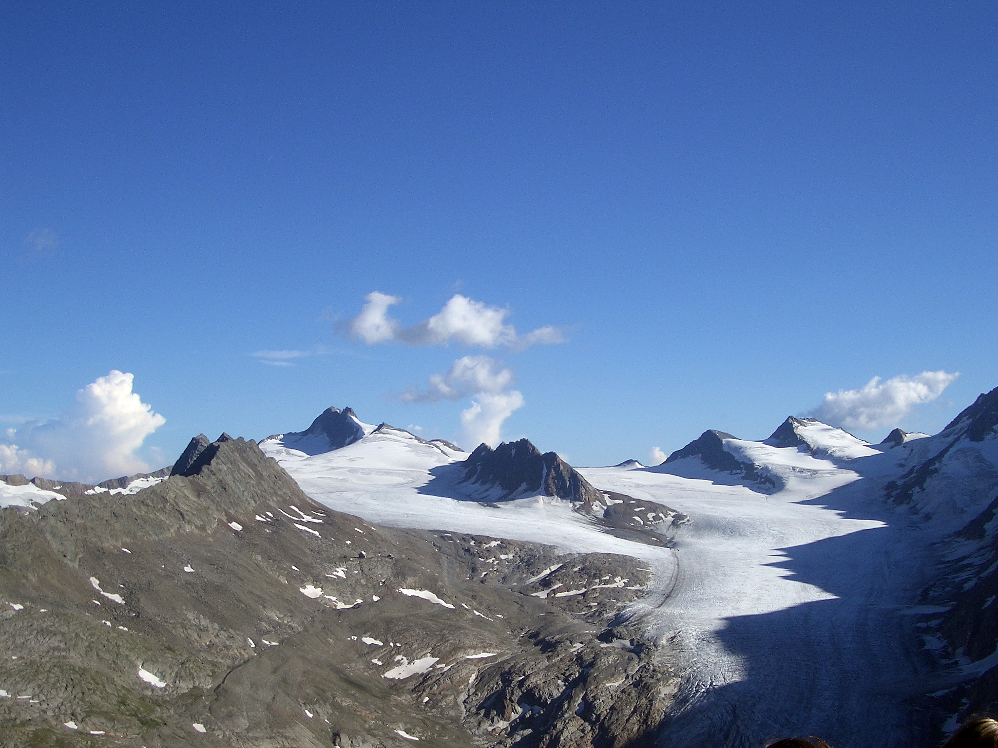 Oberer Teil des Gurgler Ferners vom Ramolhaus. Im Hintergrund (v.l.n.r.) der Schwärzenkamm, die Hochwilde (3480m), der Annakogel (3333m) mit dem markanten, nach rechts ziehenden Mitterkamm (Bildmitte), dahinter Gurgler Eisjoch (3151m), Bankspitze (3311m) und Falschunggspitze (3361m). In Blickrichtung Hochwilde ist das Hochwildehaus erkennbar.